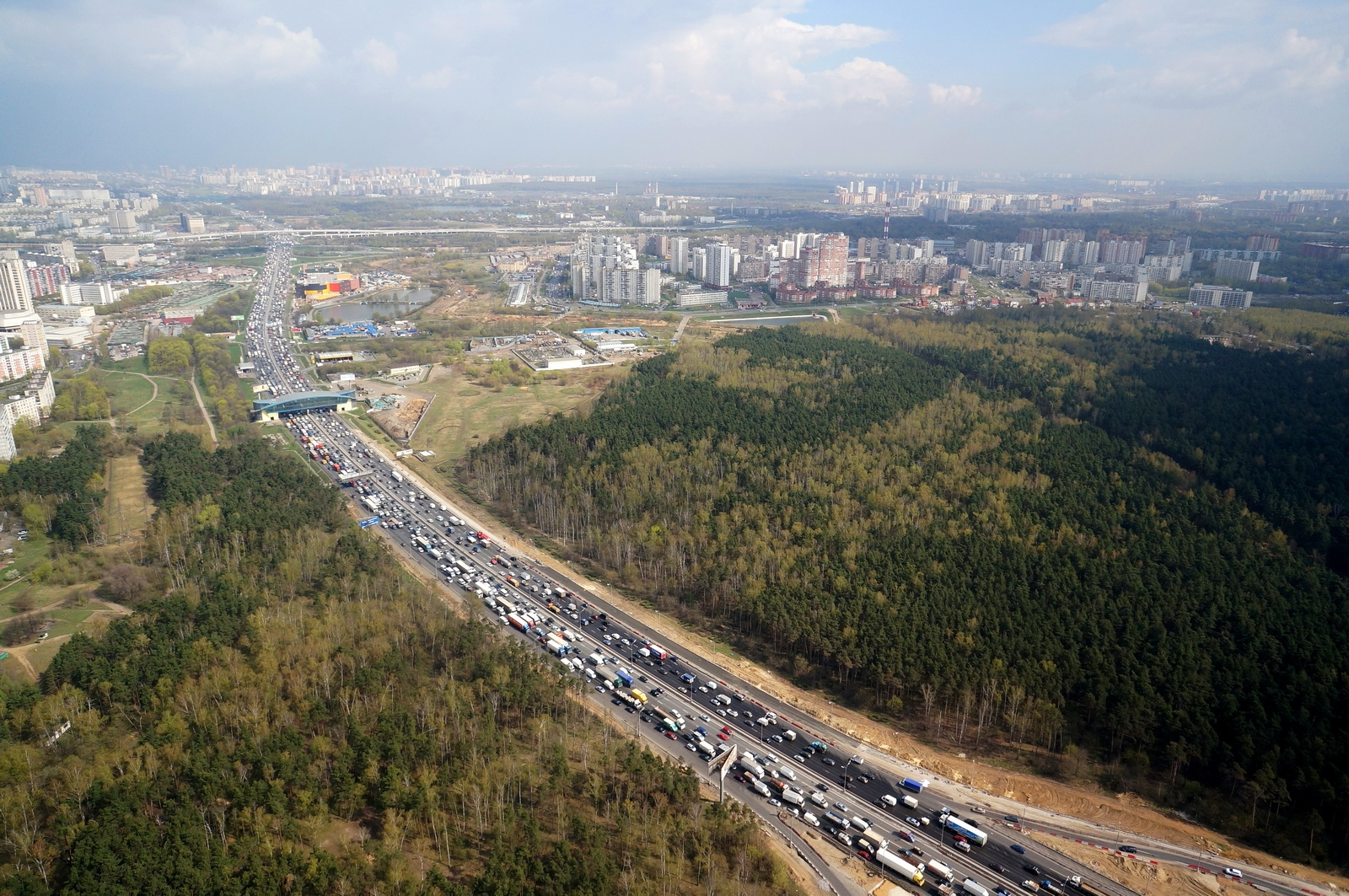 Выхино-Жулебино, МКАД и Жулебинский заказник (2014)